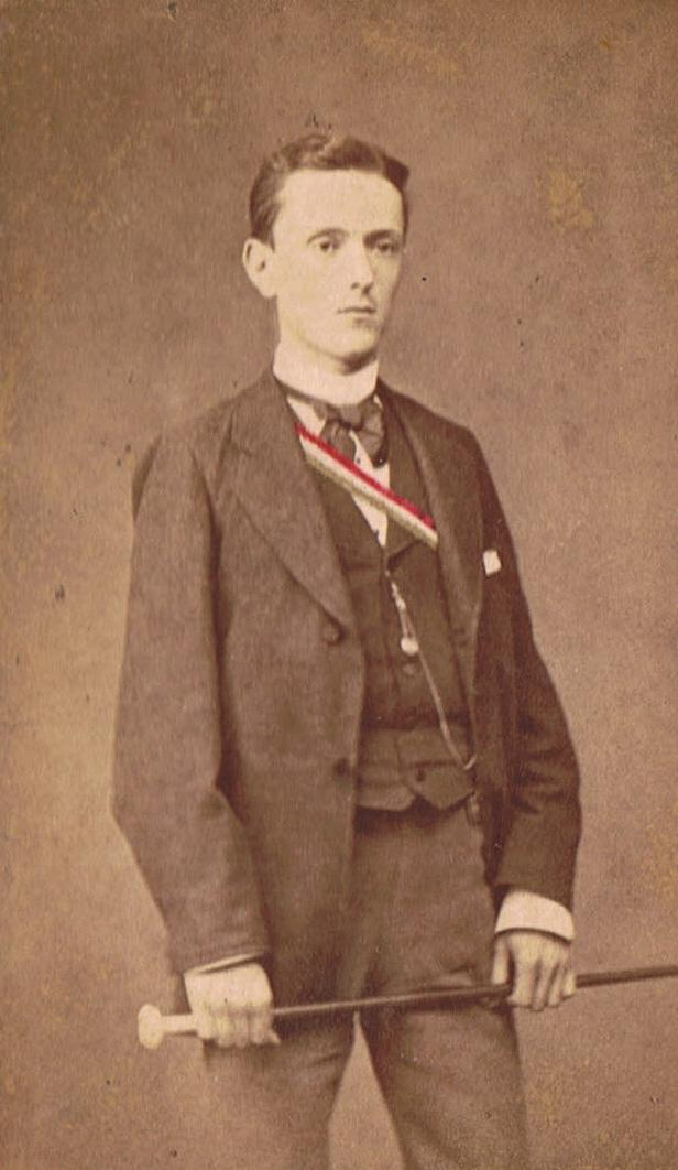 Fotografie von Hugo Molitor als Student in Gießen